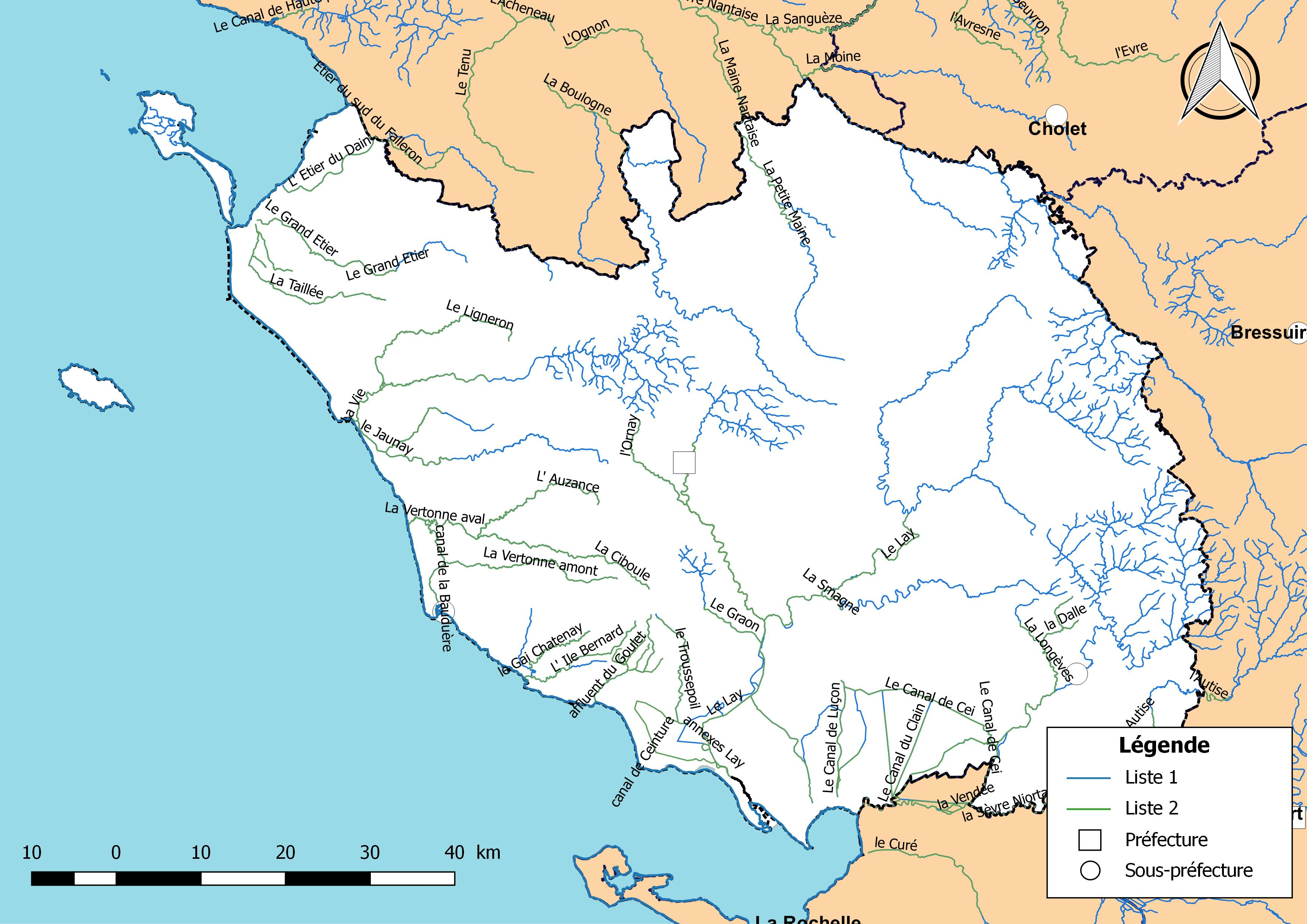 Classement des cours d'eau du département de la Vendée (France) au titre de la continuité écologique (article L214.17 I du Code de l'environnement).